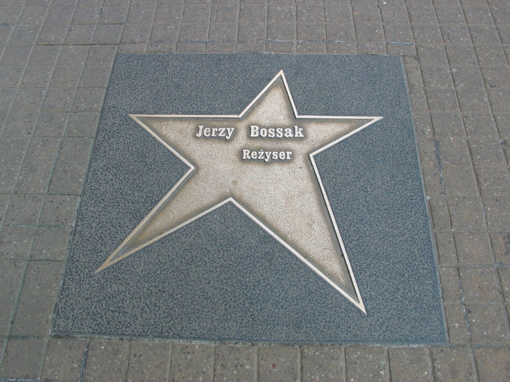 Łódź Walk of Fame - reżyser Jerzy Bossak.